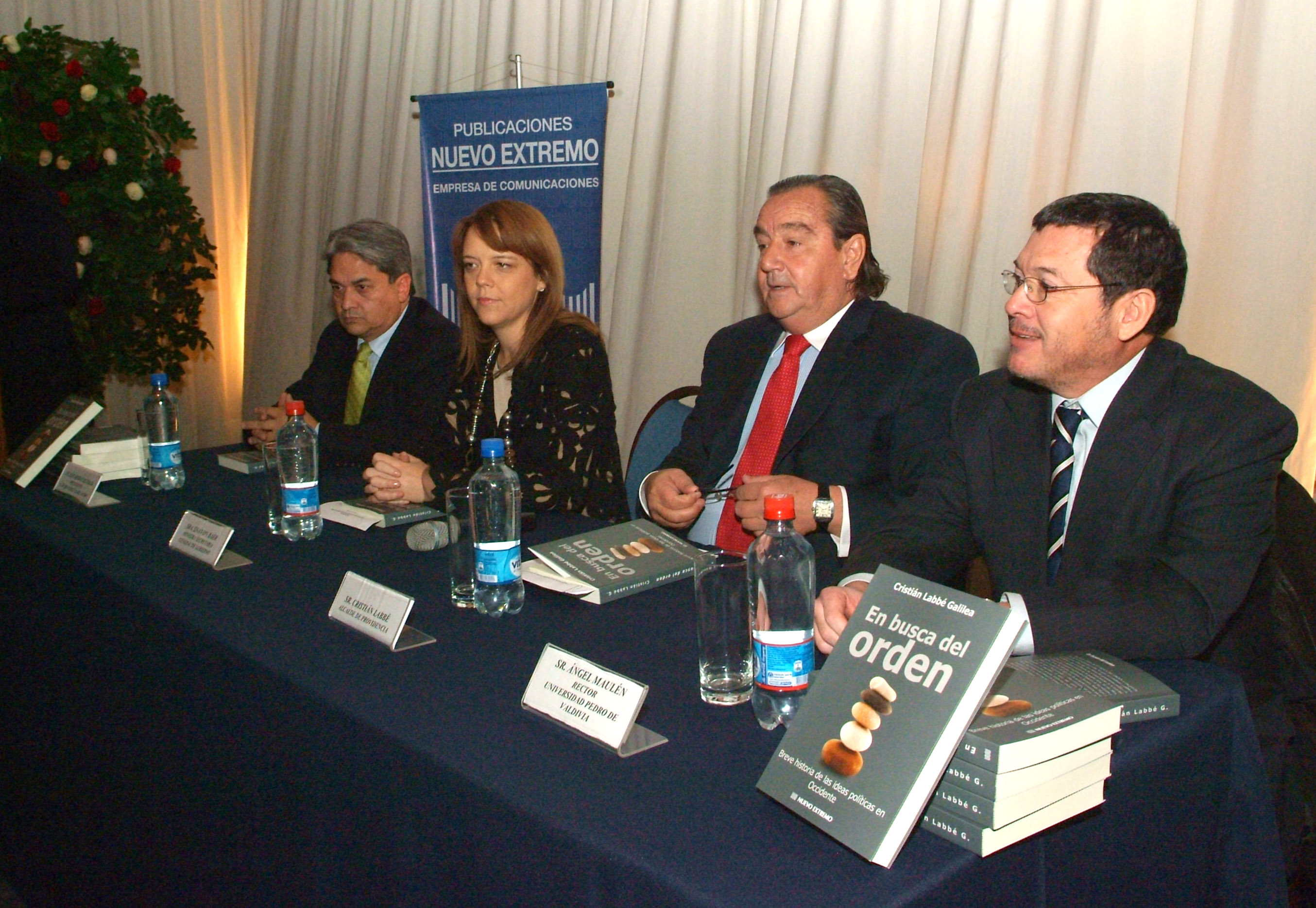 La Ministra Secretaria General de Gobierno,Ena von Baer.presenta el libro"En Busca del Orden"de Cristian Labbe.